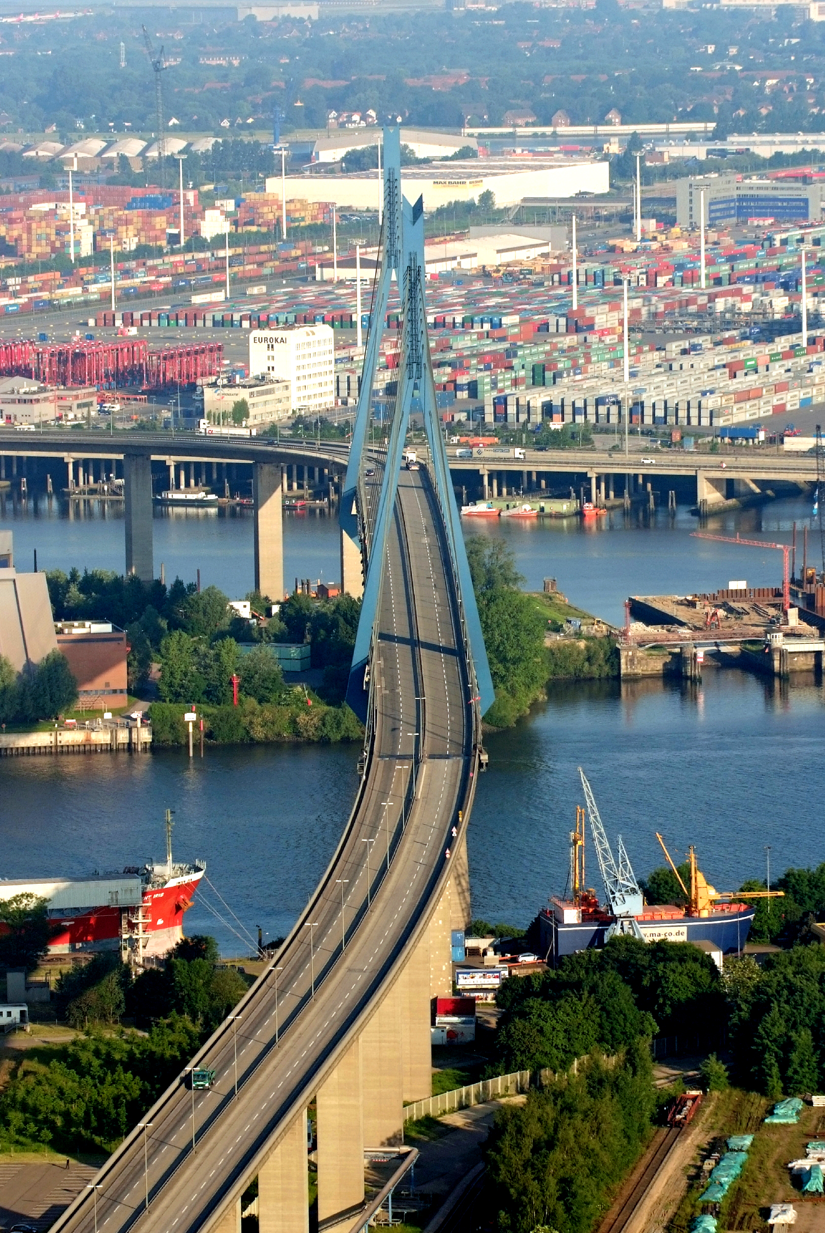 Projekt Heißluftballon Köhlbrandbrücke